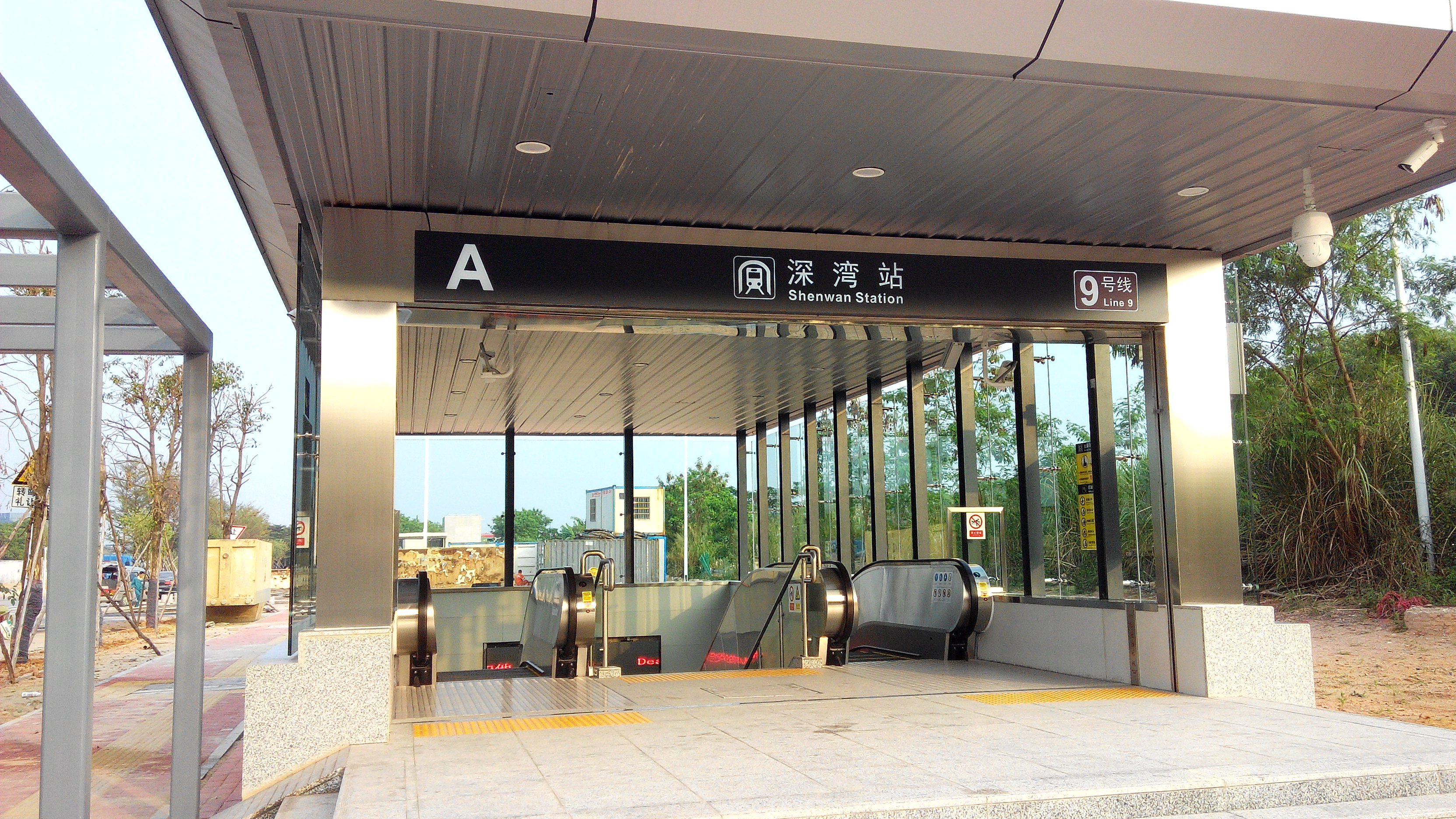 深圳地铁9号线 深湾站A出口